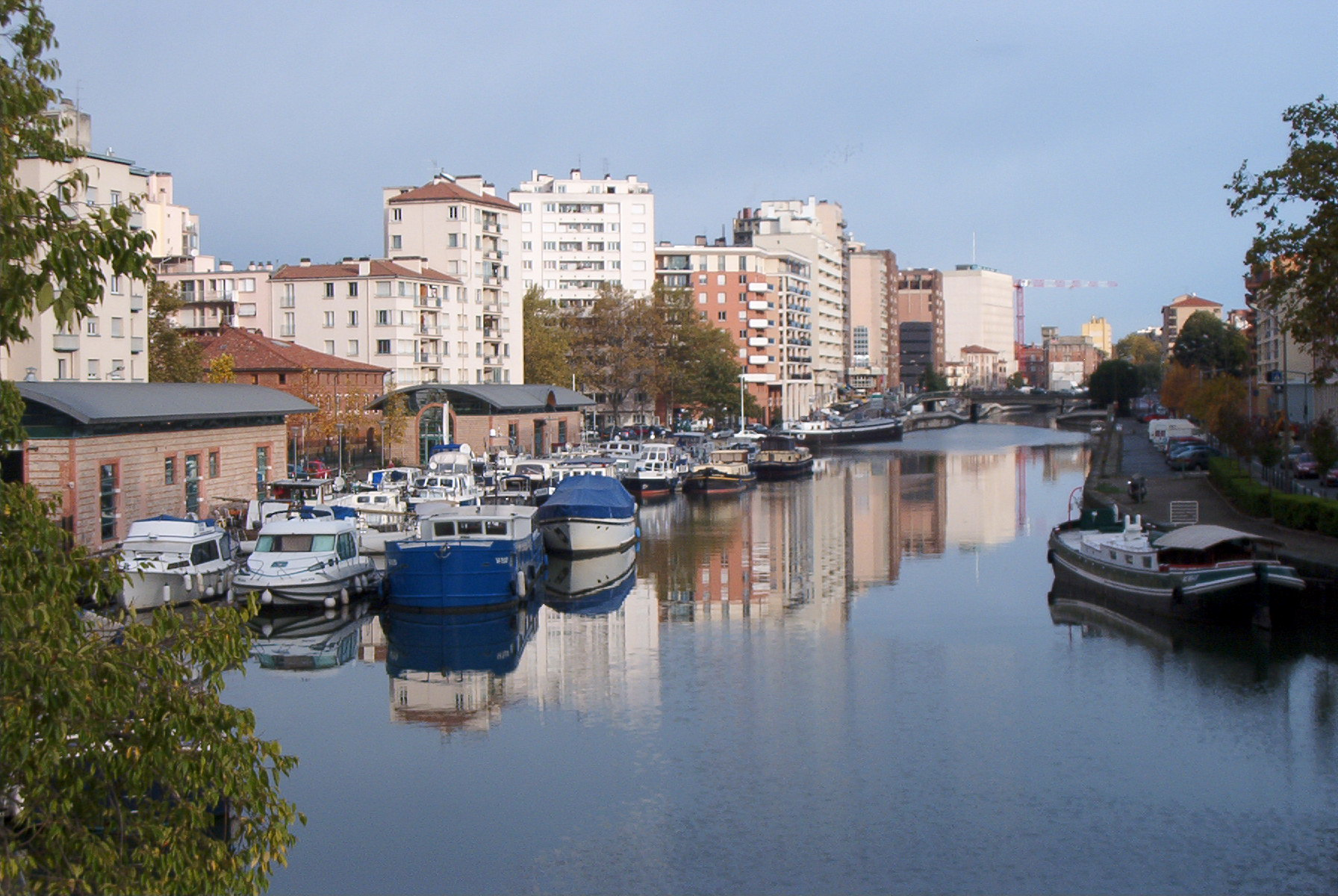 Le Port Saint-Sauveur sur le Canal du Midi à Toulouse (Haute-Garonne, France).